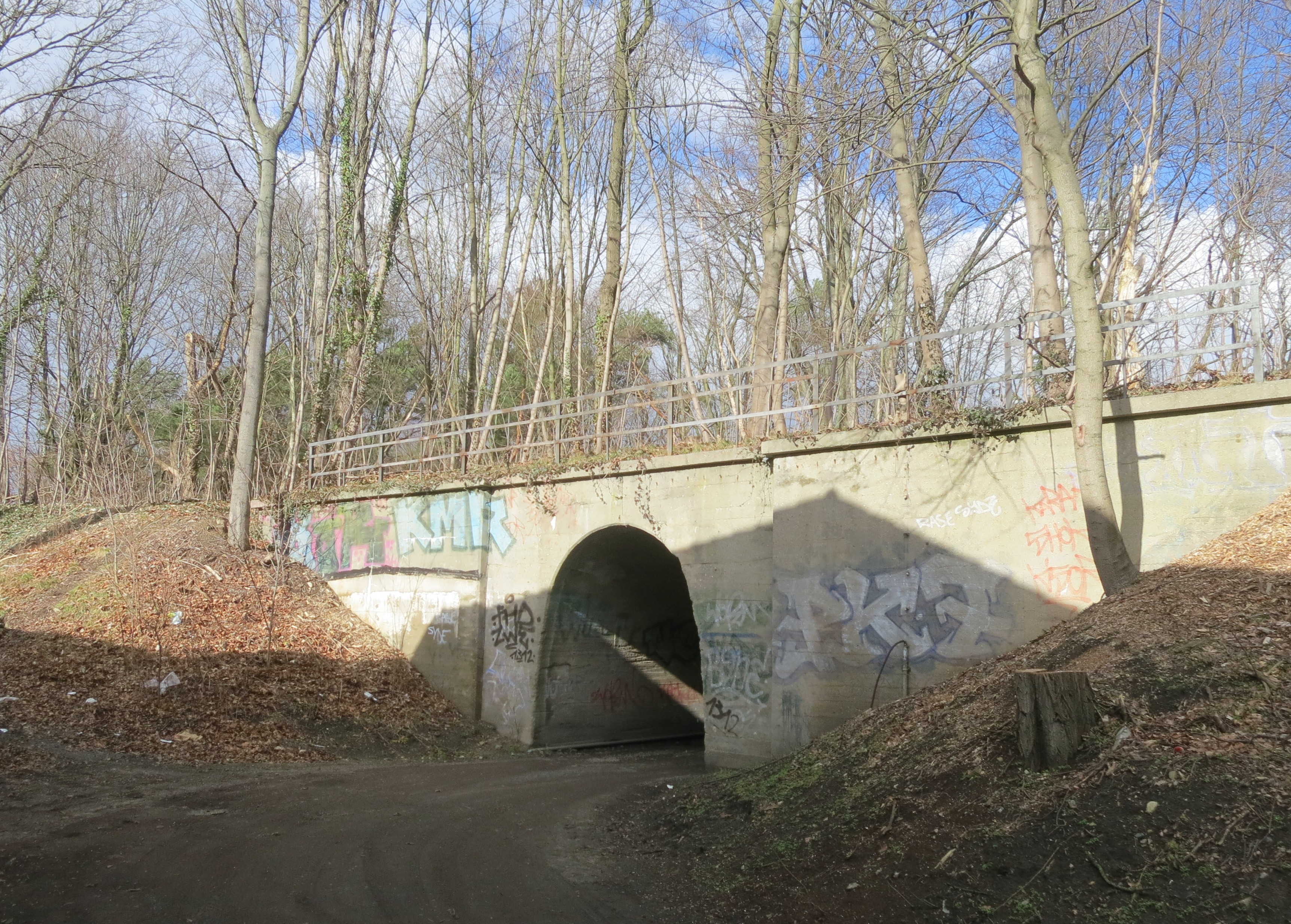 Brücke und Damm der Verbindungskurve vom Güteraußenring zum Bahnhof Berlin-Grünau